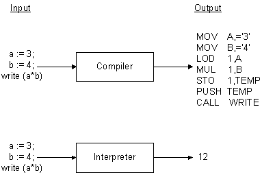 կոմպիլինտեր